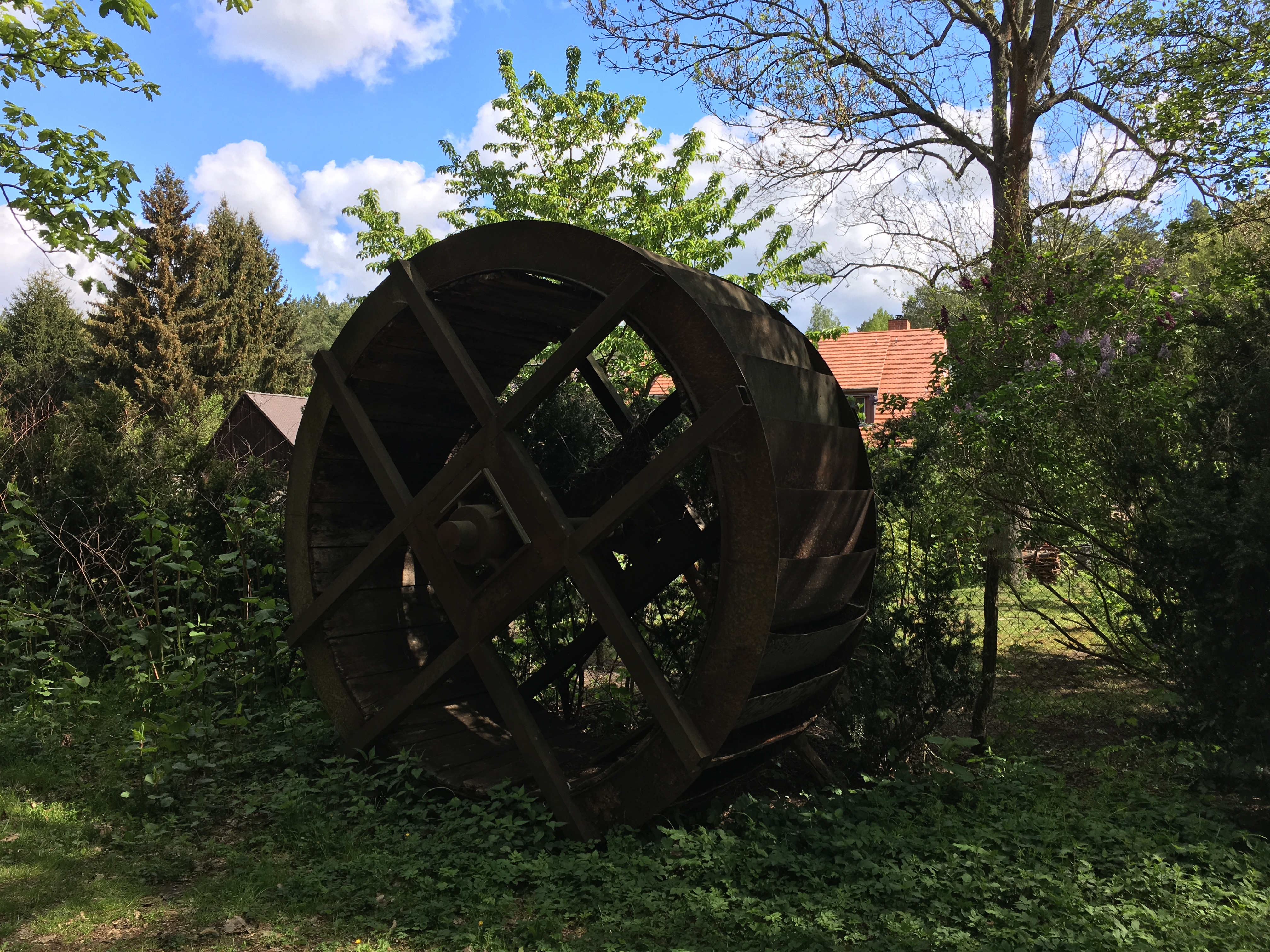 Hermannsmühle, ein denkmalgeschütztes Ensemble in Treuenbrietzen-Bardenitz in Brandenburg